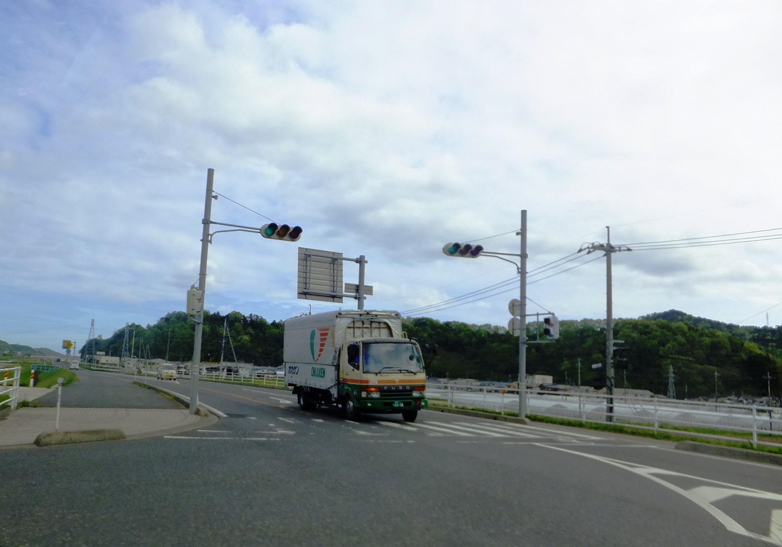 鳥取県倉吉市大原 鳥取県道21号鳥取鹿野倉吉線